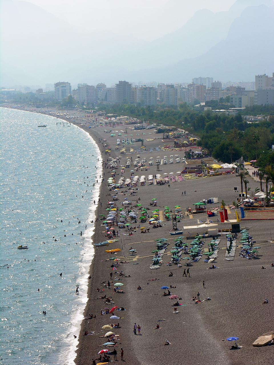 Turkey-2624